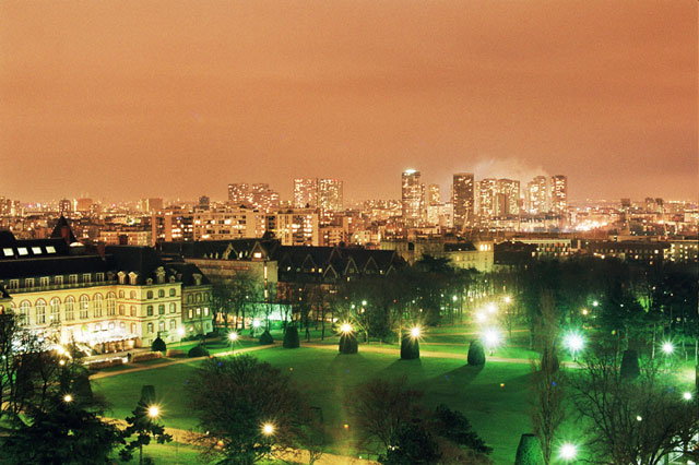 Vue Nocturne de la Cité internationale universitaire de Paris